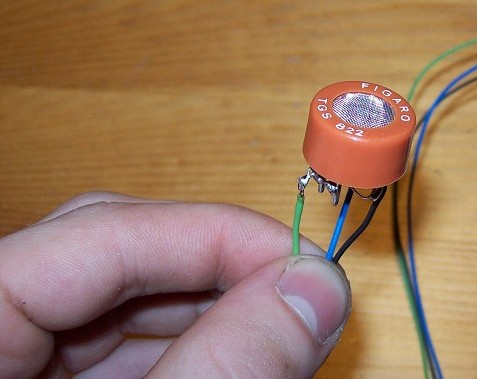 Ein TGS 822er-Gassensor von Figaro.